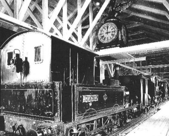 Järnvägsmuseet Tomteboda, vagnhall med SJ-klockan